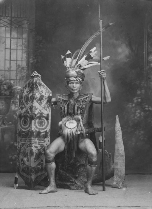 Foto. Studioportret van een Dajak in krijgskleding